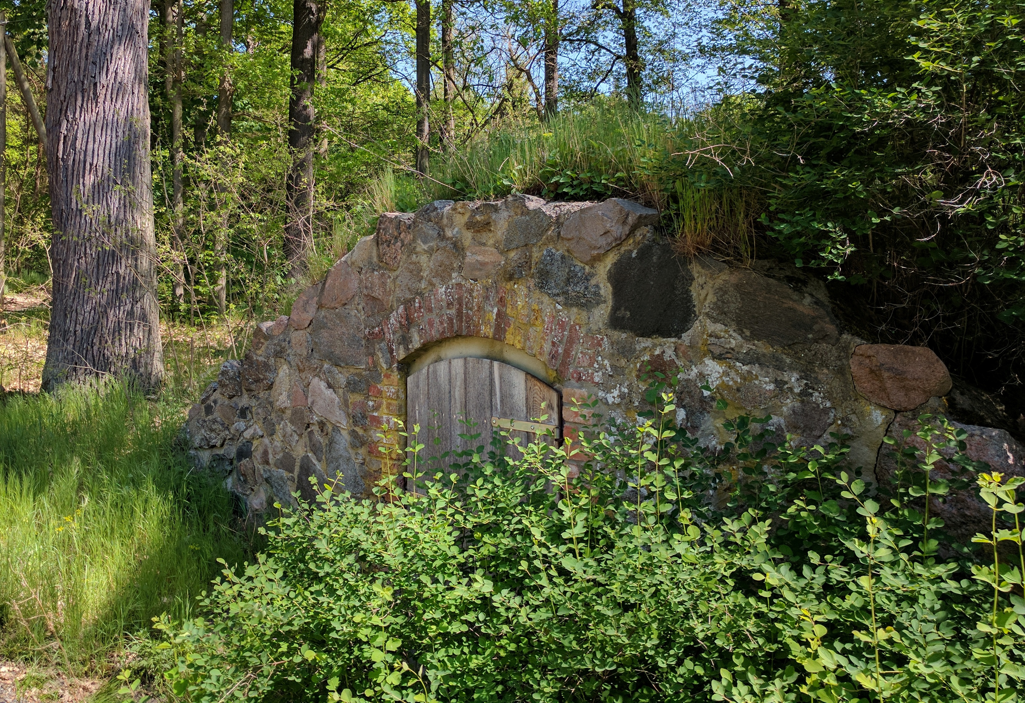 Ehemaliger Wildkeller am Forsthaus Dubrow im Waldgebiet der Dubrow (Land Brandenburg, Landkreis Dahme-Spreewald, Gemarkung Gräbendorf). Der Wildkeller diente ursprünglich als Kühllager für erlegtes Wild in der Dubrow. Heute ist er ein geschütztes Fledermausquartier.